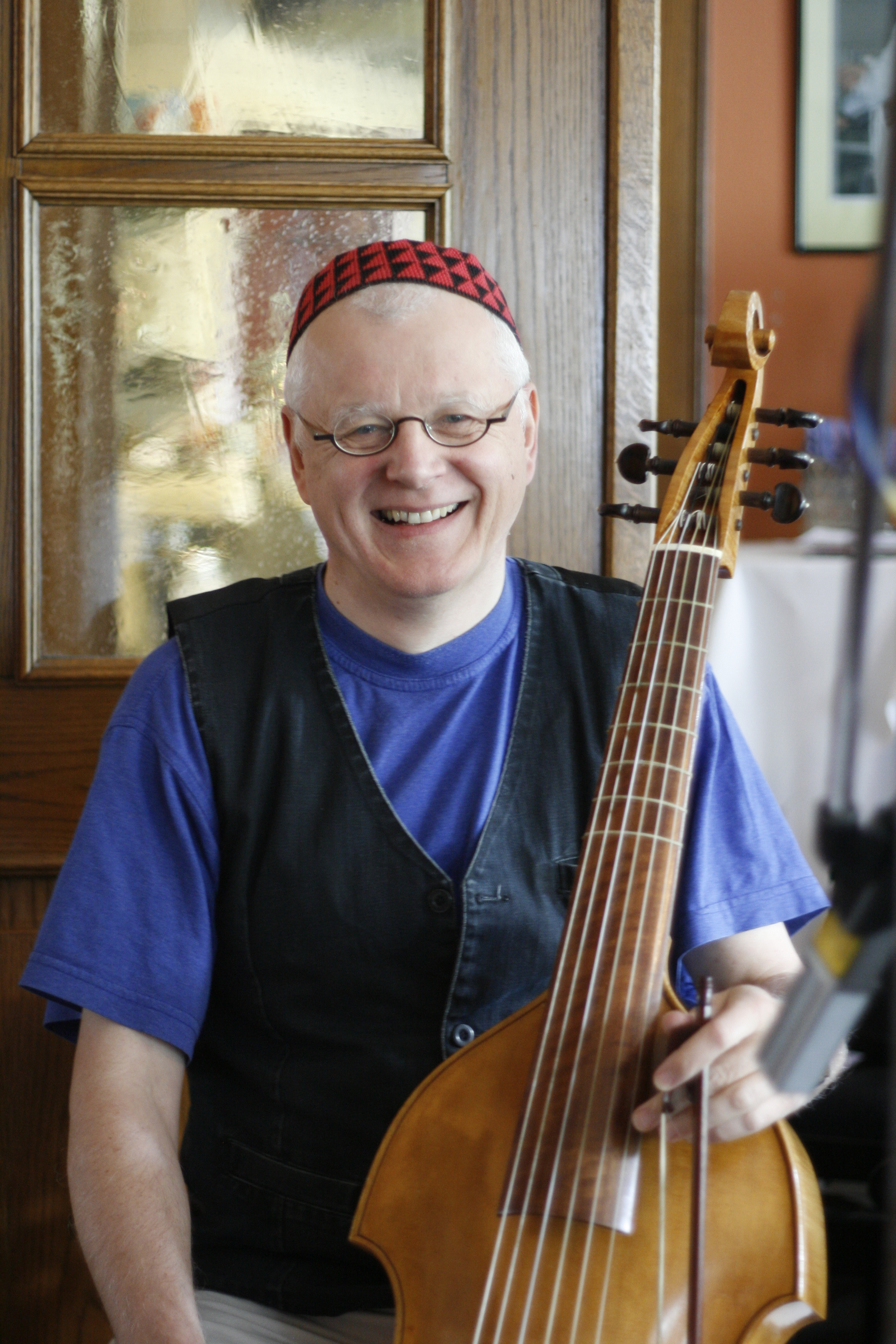 Uli Führe